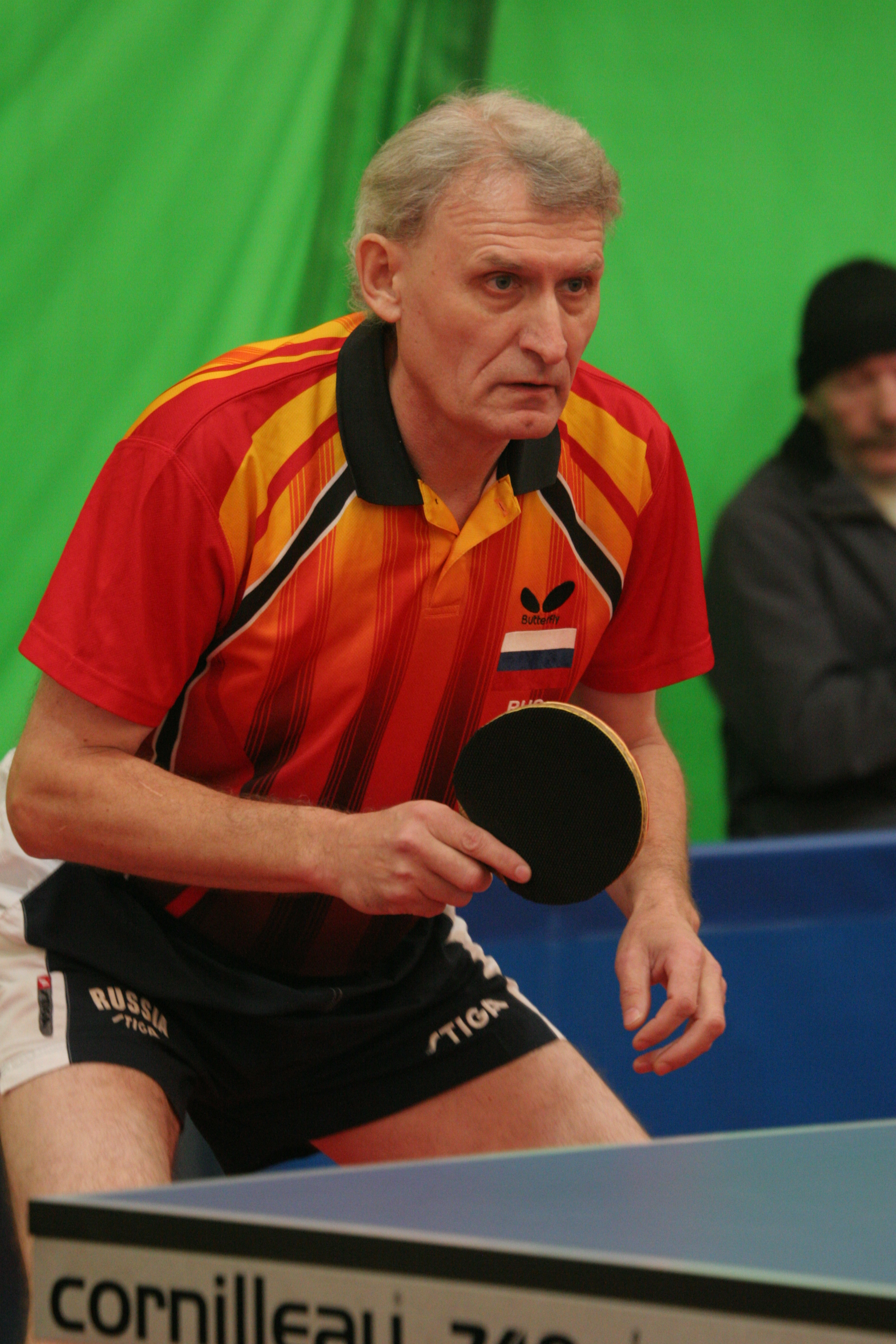 Владимир Барашкин на ветеранском турнире по настольному теннису "20 лет спустя", 18 декабря 2007 года